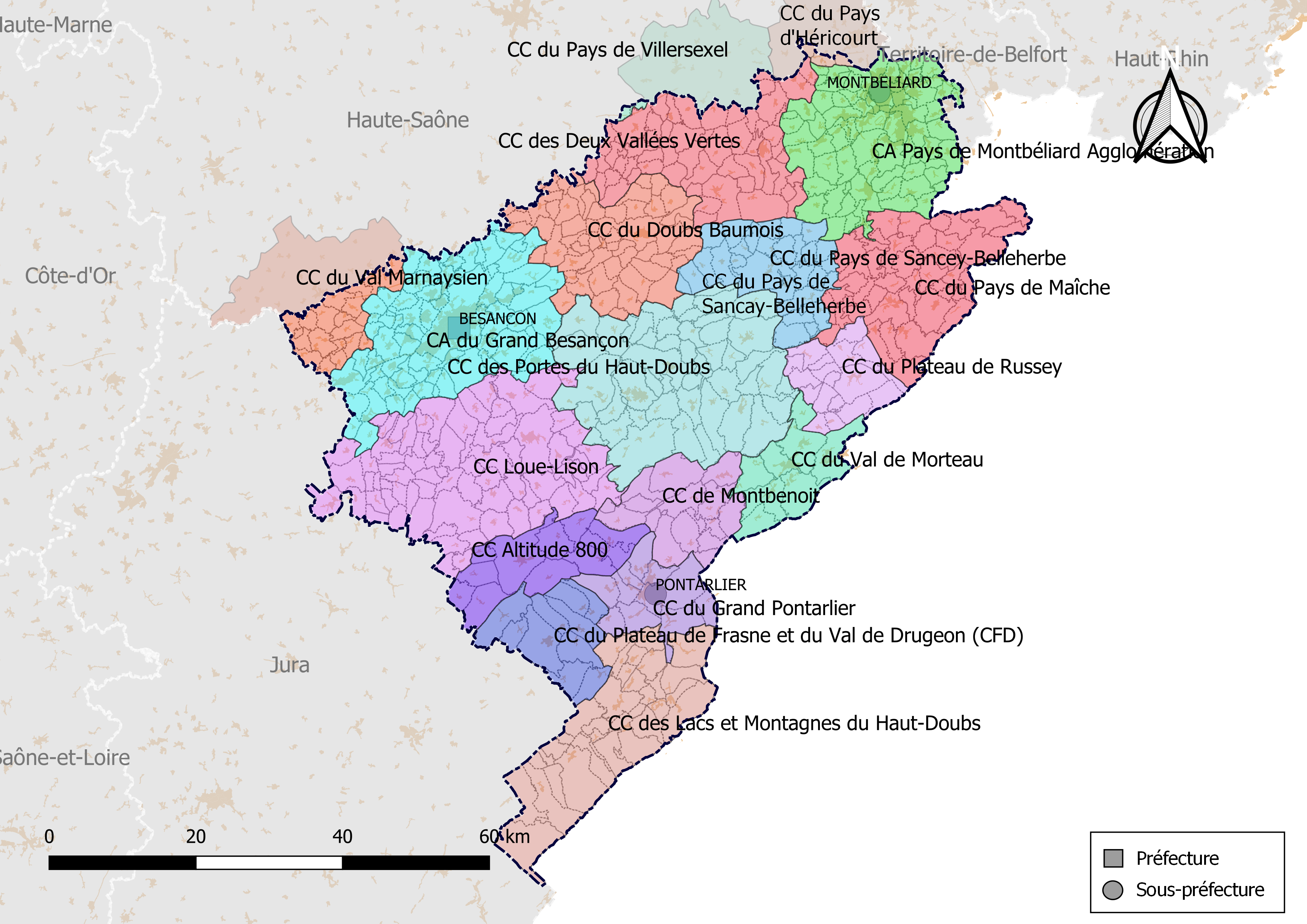 Carte des intercommunalités du département du Doubs, France. Composition au 1er janvier 2019.